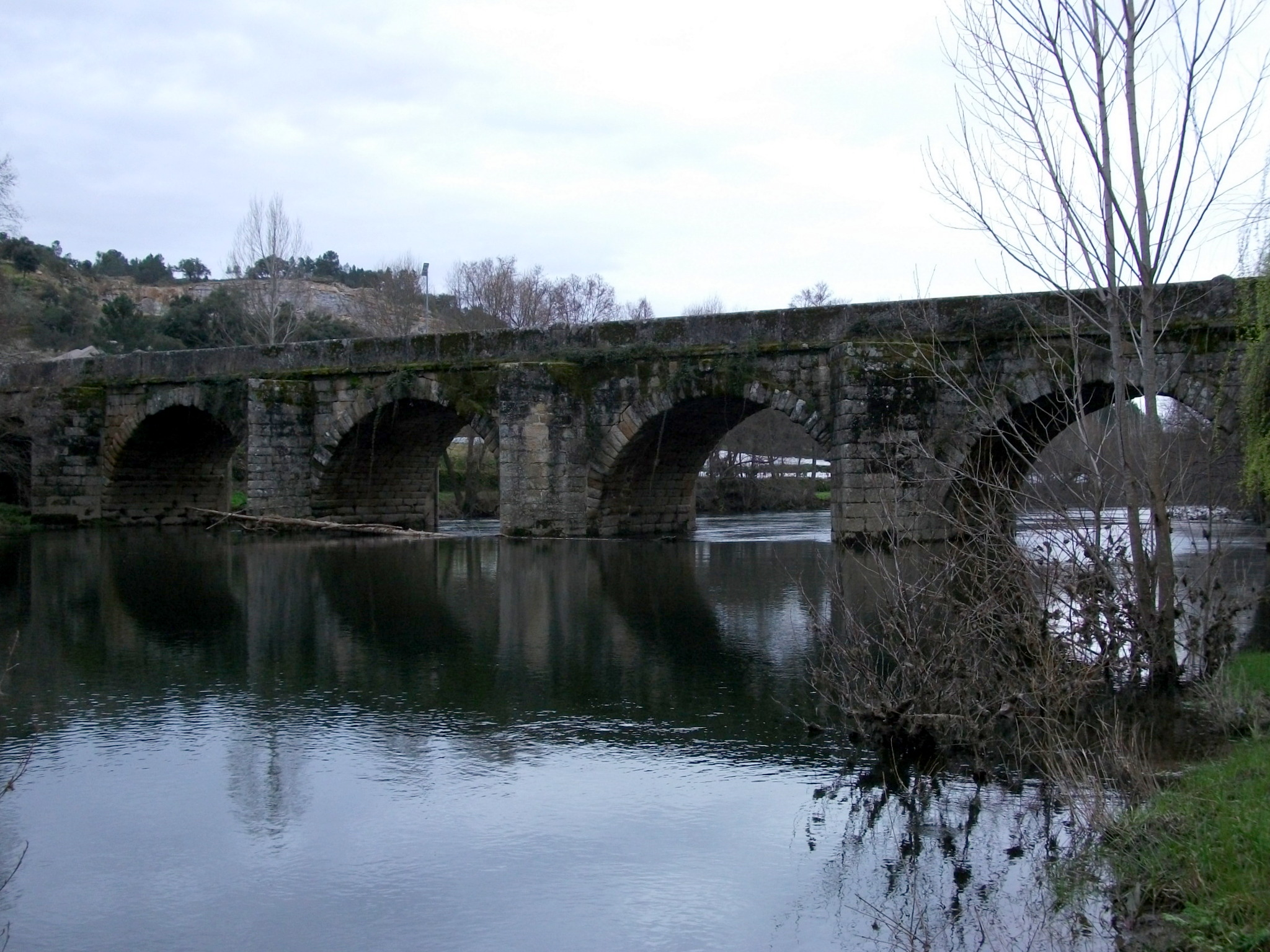 Vista de montante margem direita base da "Ponte de pedra sobre o rio Tuela", também referida como "Ponte Românica sobre o rio Tuela" ou "Ponte de Torre de Dona Chama", na Estrada Nacional 206 em Torre de Dona Chama, Portugal.